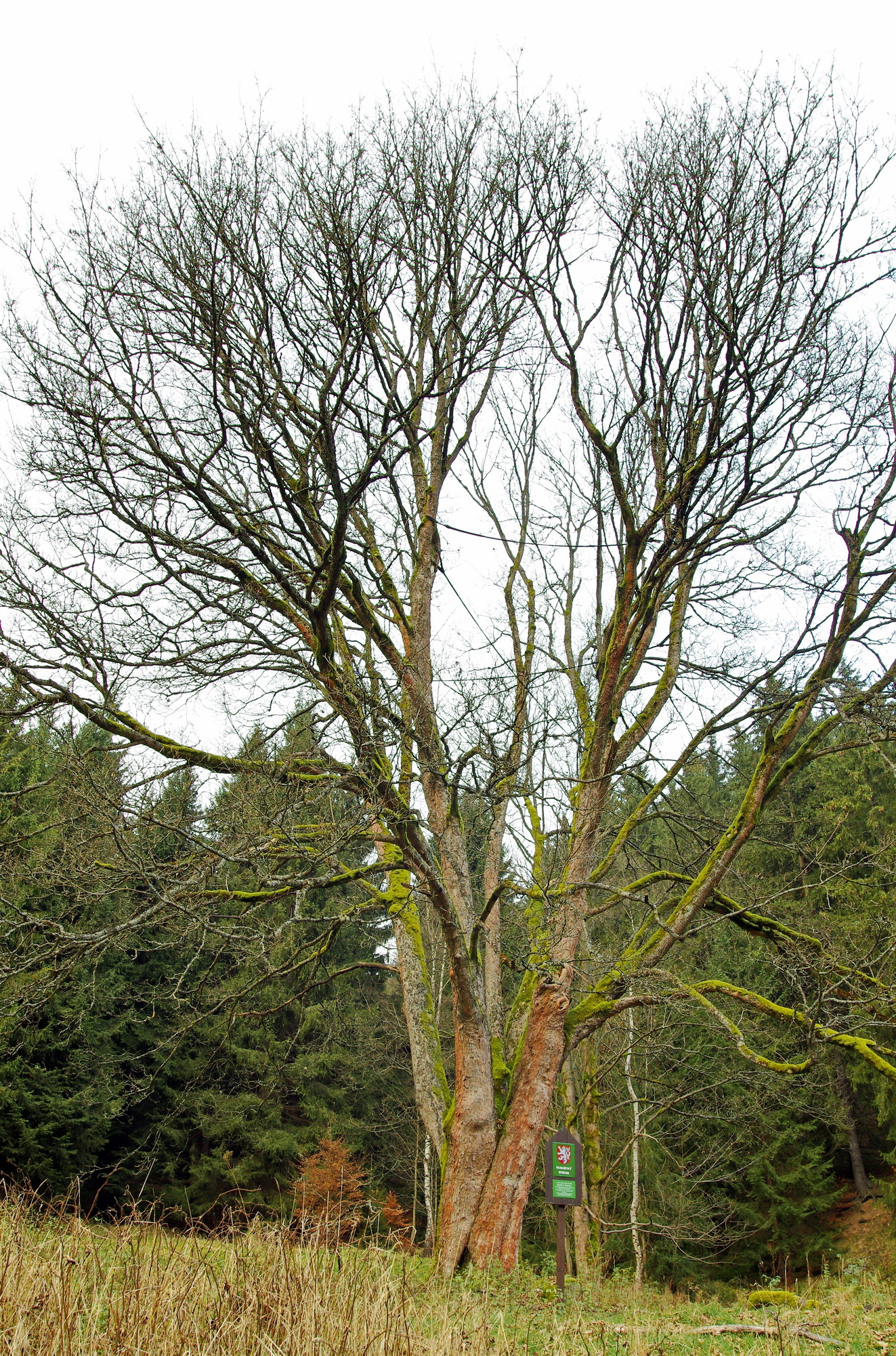 památný strom - Klen v Nancy - Stříbrná, okres Sokolov